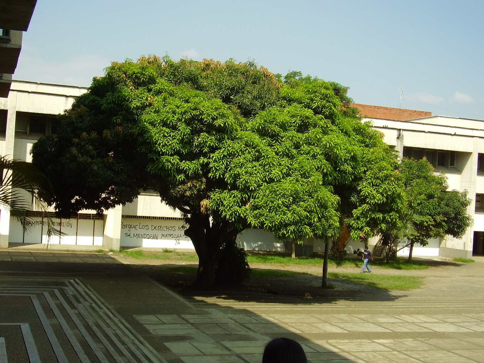 Entre la Biblioteca Central y la Facultad de Ciencias